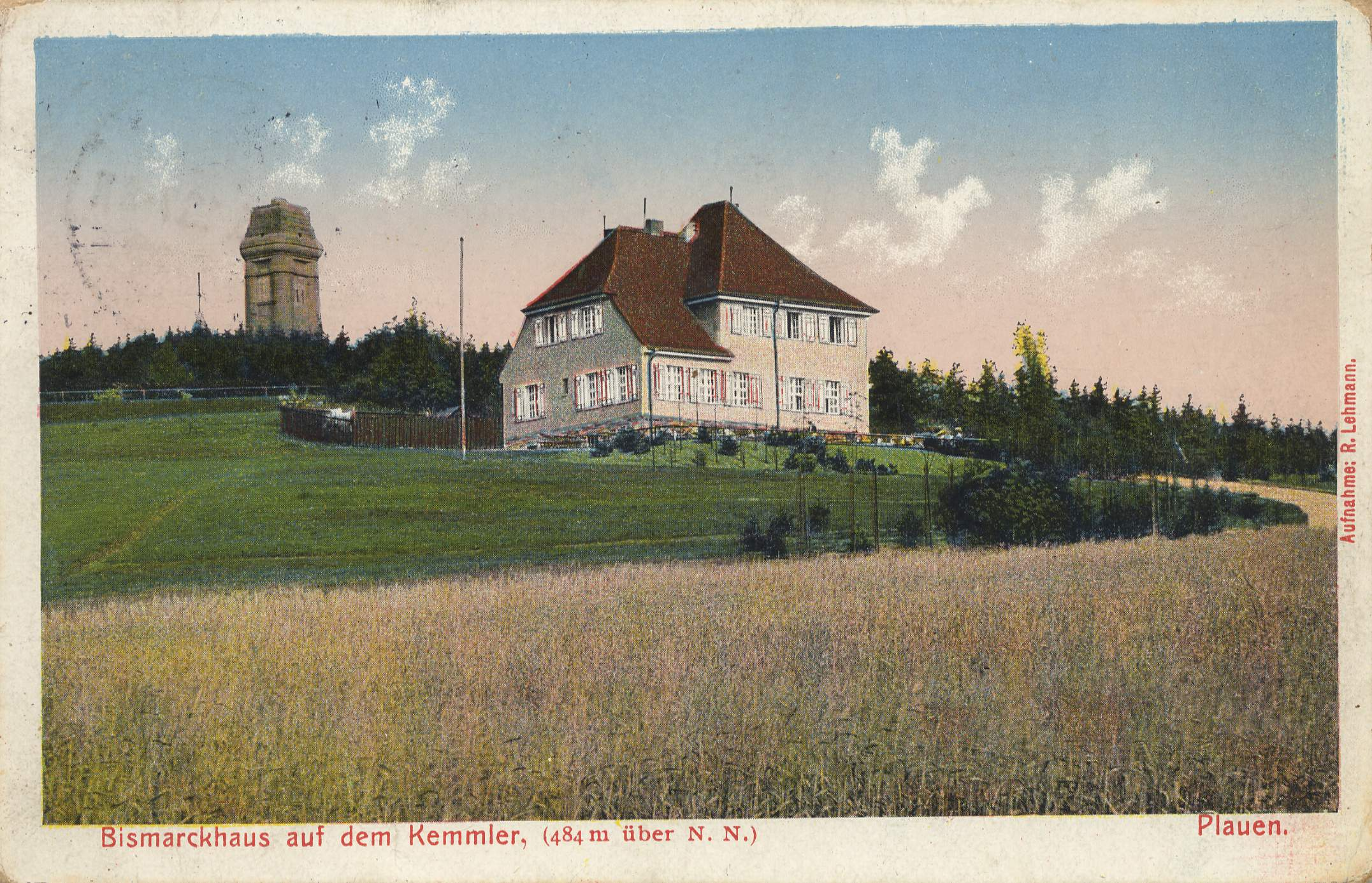 Bismarckhaus auf dem Kemmler